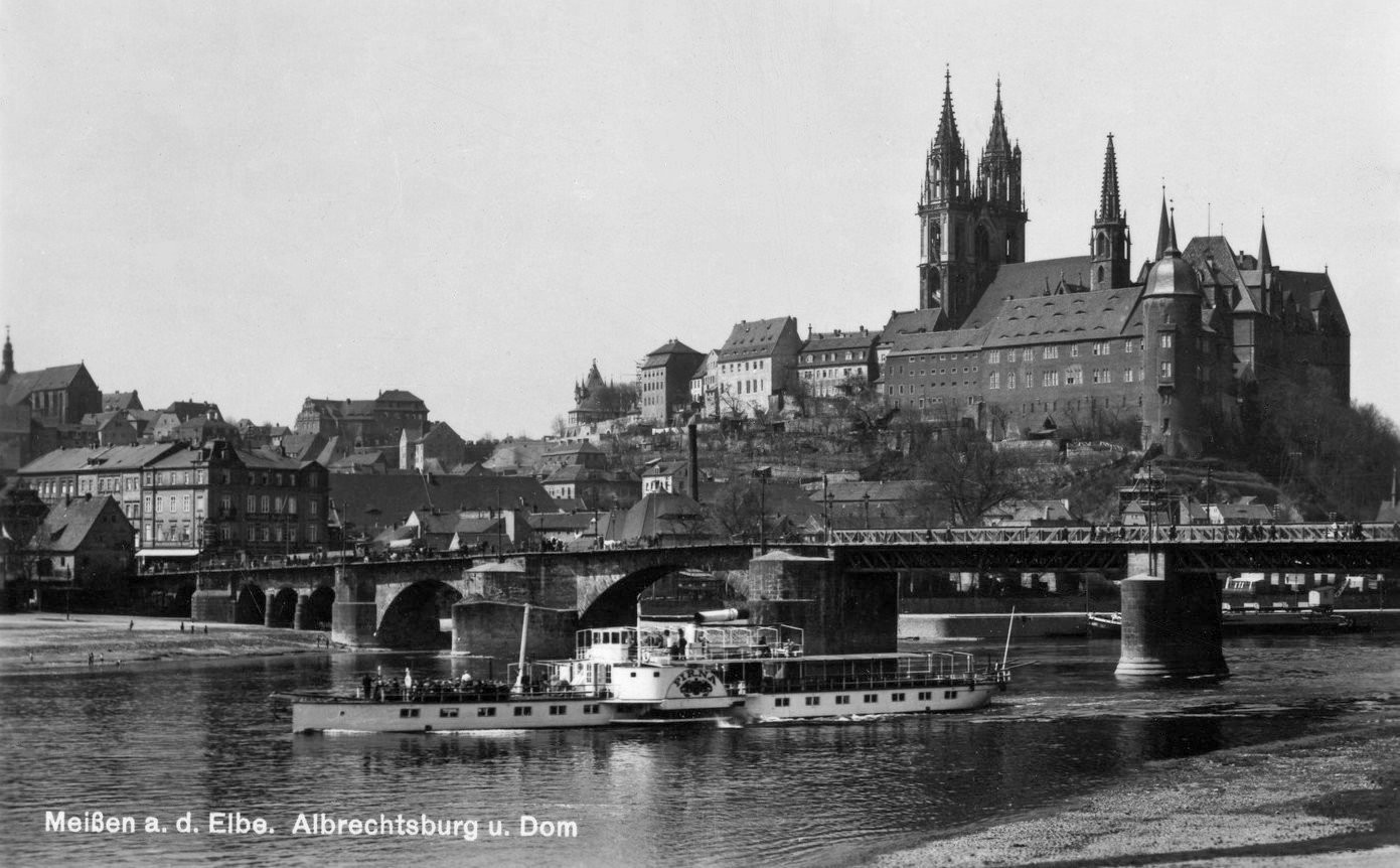 Meißen; Albrechtsburg und Dom - Elbe mit Dampfer Pirna This postcard is from publisher Brück & Sohn in Meißen ( postcard has a unique number 24850 and is available in a higher resolution at the publisher. This images was uploaded in a cooperation project between Wikipedians and the publisher.